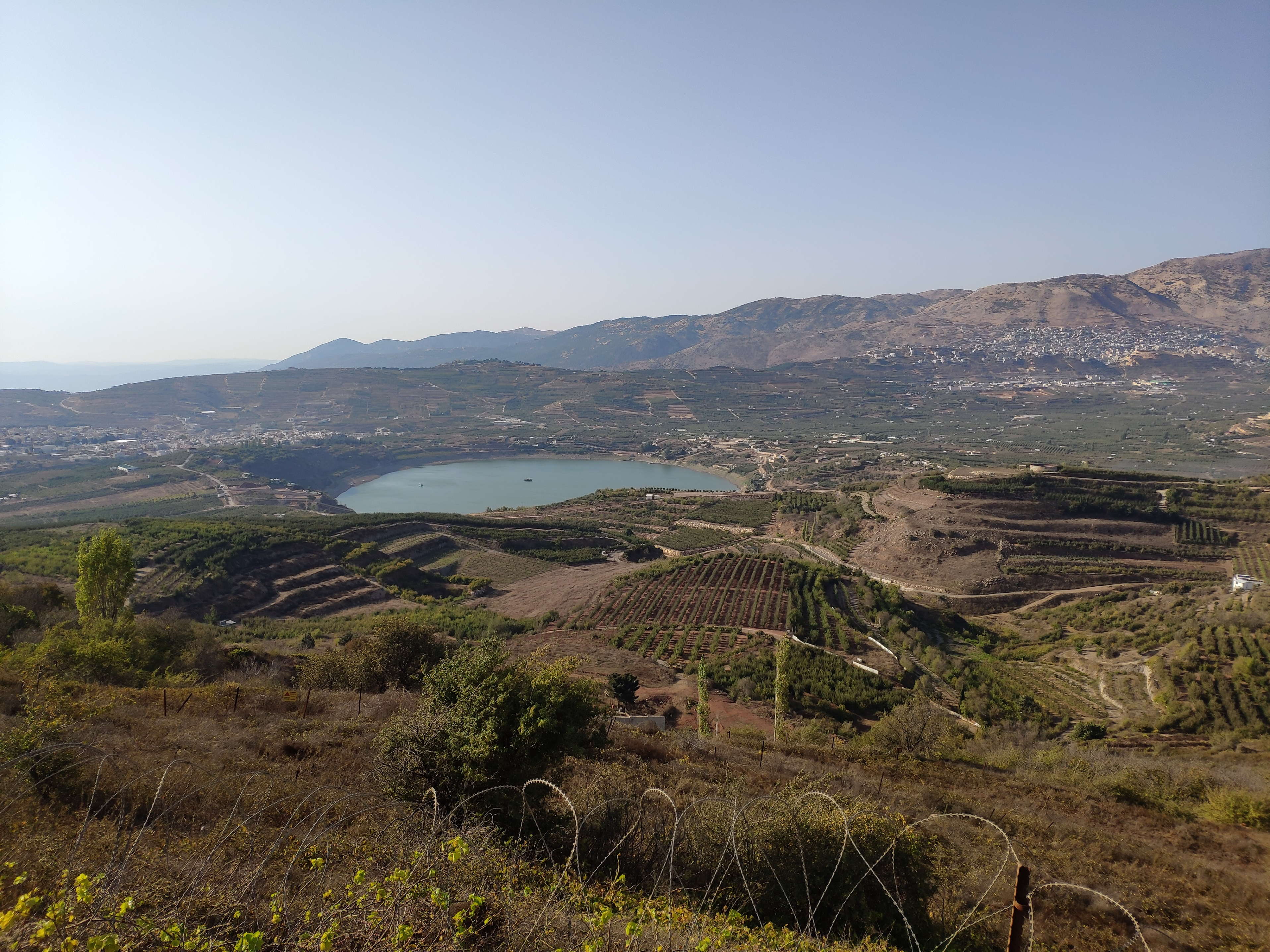 Ram Pool from Mount Kramim